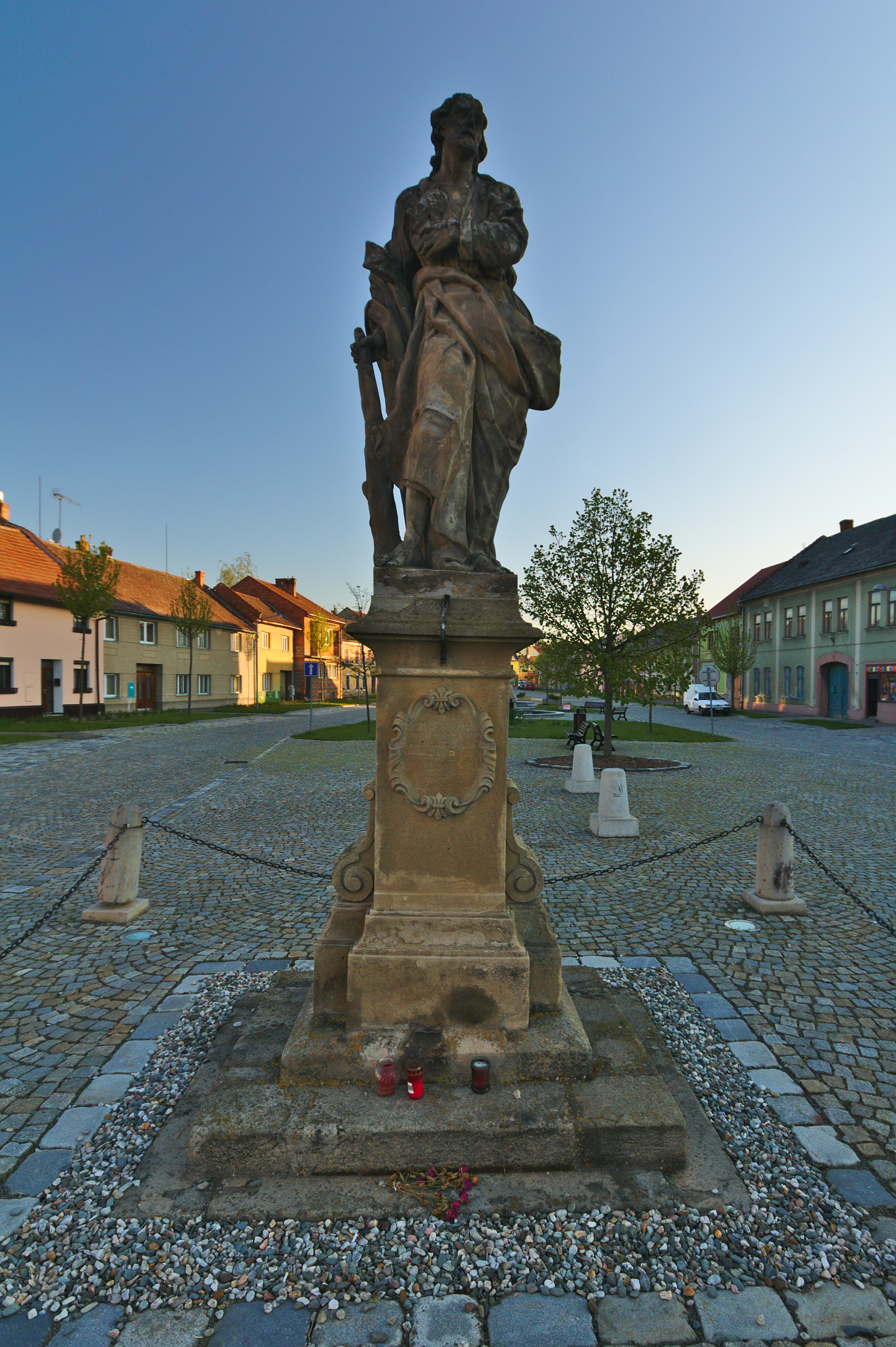 Socha svatého Judy Tadeáše, Němčice nad Hanou, okres Prostějov